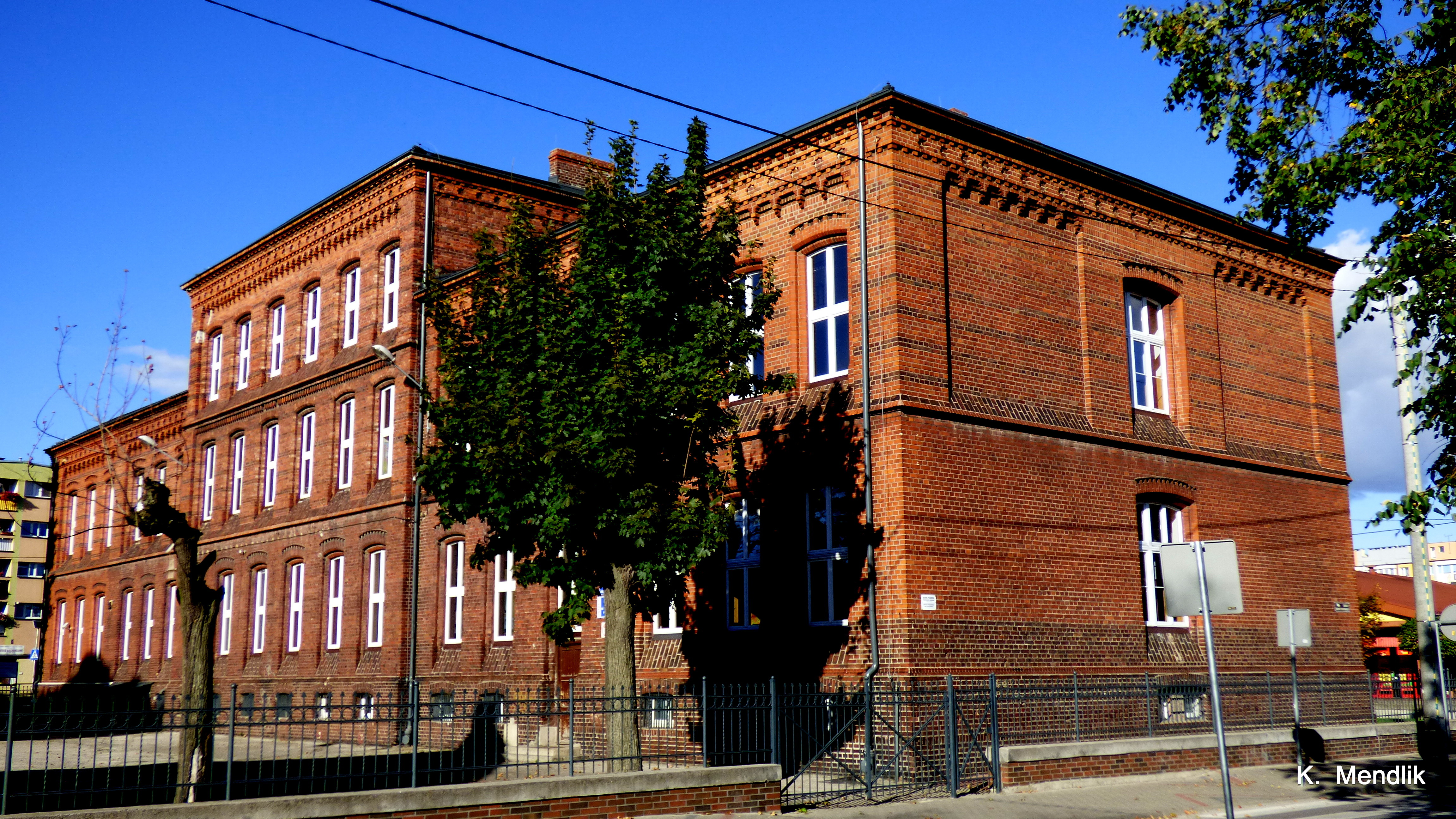 Nakło nad Notecią - Liceum Ogólnokształcęce nr 1 im Bolesława krzywoustego